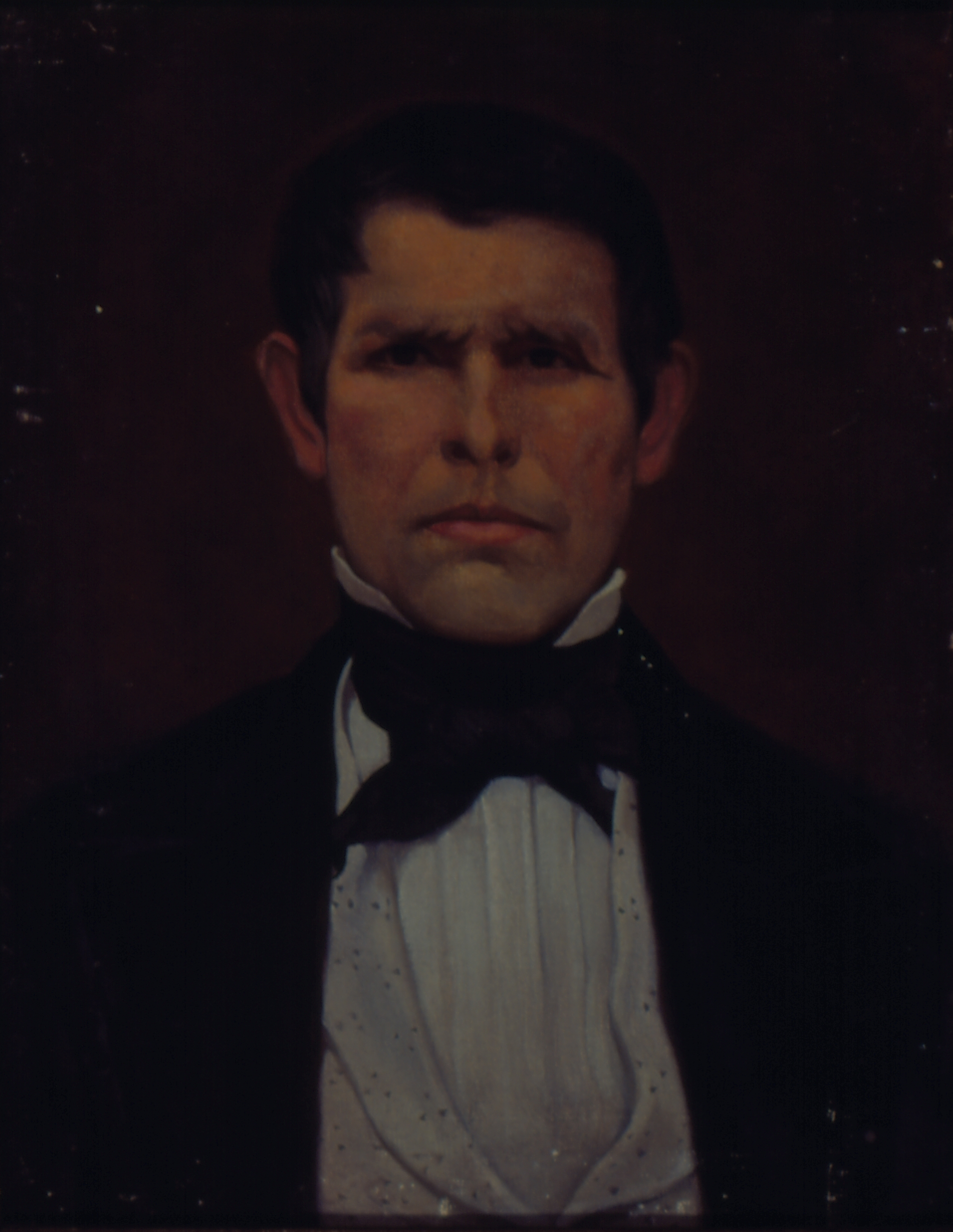 Obra que integra o acervo do Museu Paulista da USP.